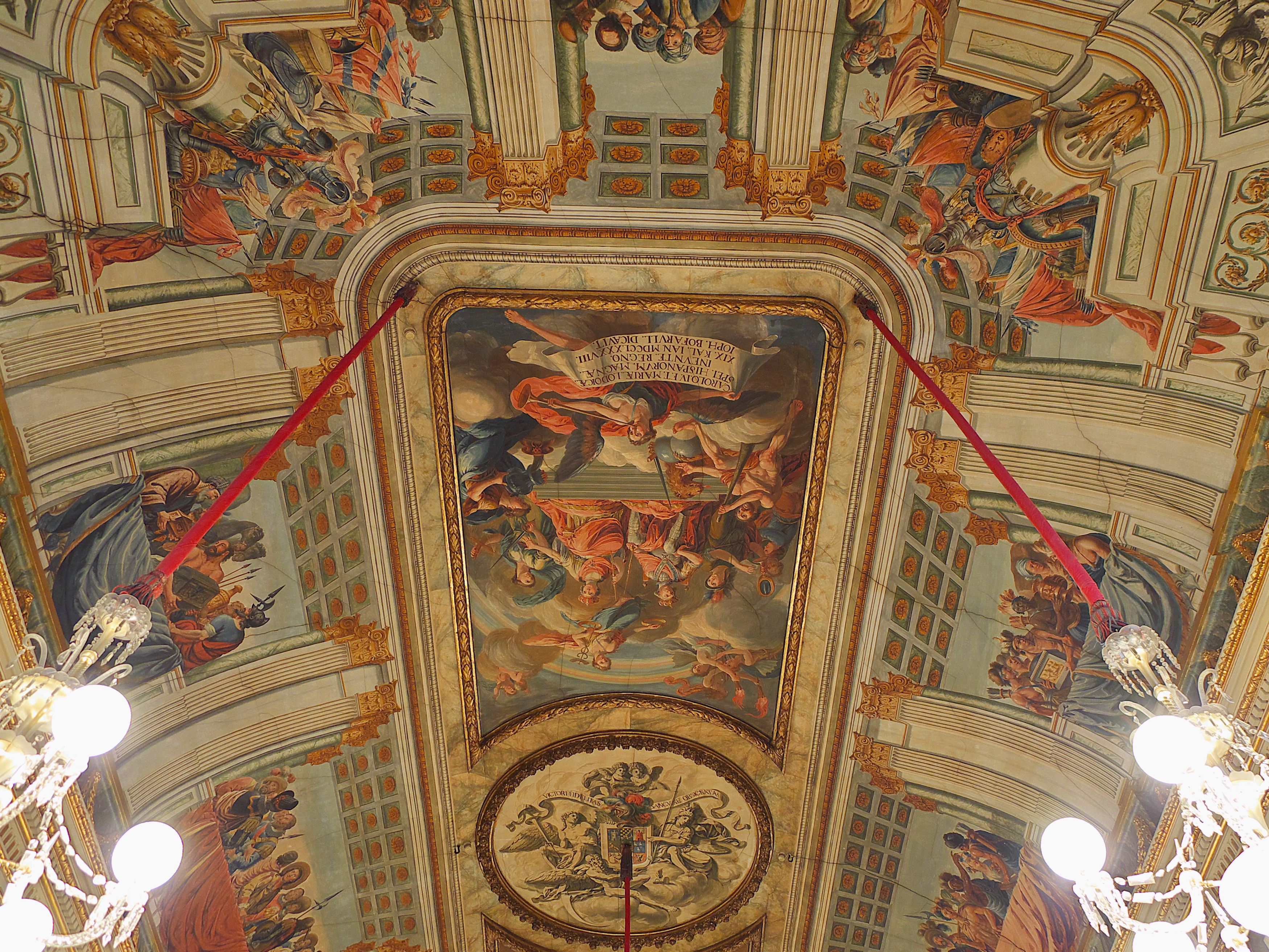 Pintura del techo del palacio Bofarull realizada por Pedro Montaña y el francés Flaugier (1790)